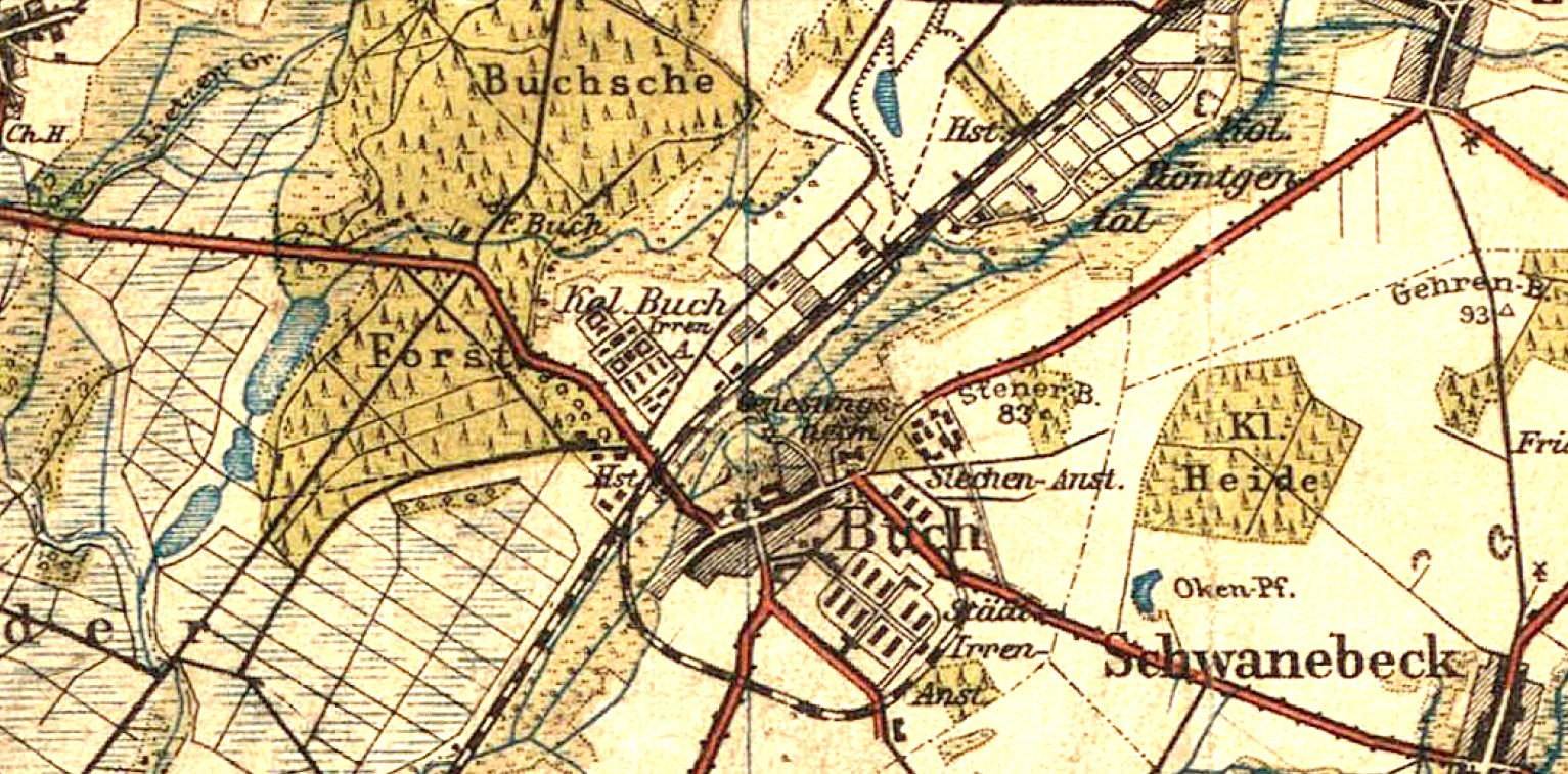 Die Karte ist ein Ausschnitt um den Ortsteil Buch mit den Heilstätten Buch. Es wurde das Digitalisat der frei verfügbaren Karte: Kieslings Große Specialkarte der Umgebung von Berlin auf den notwendigen Bereich beschnitten.